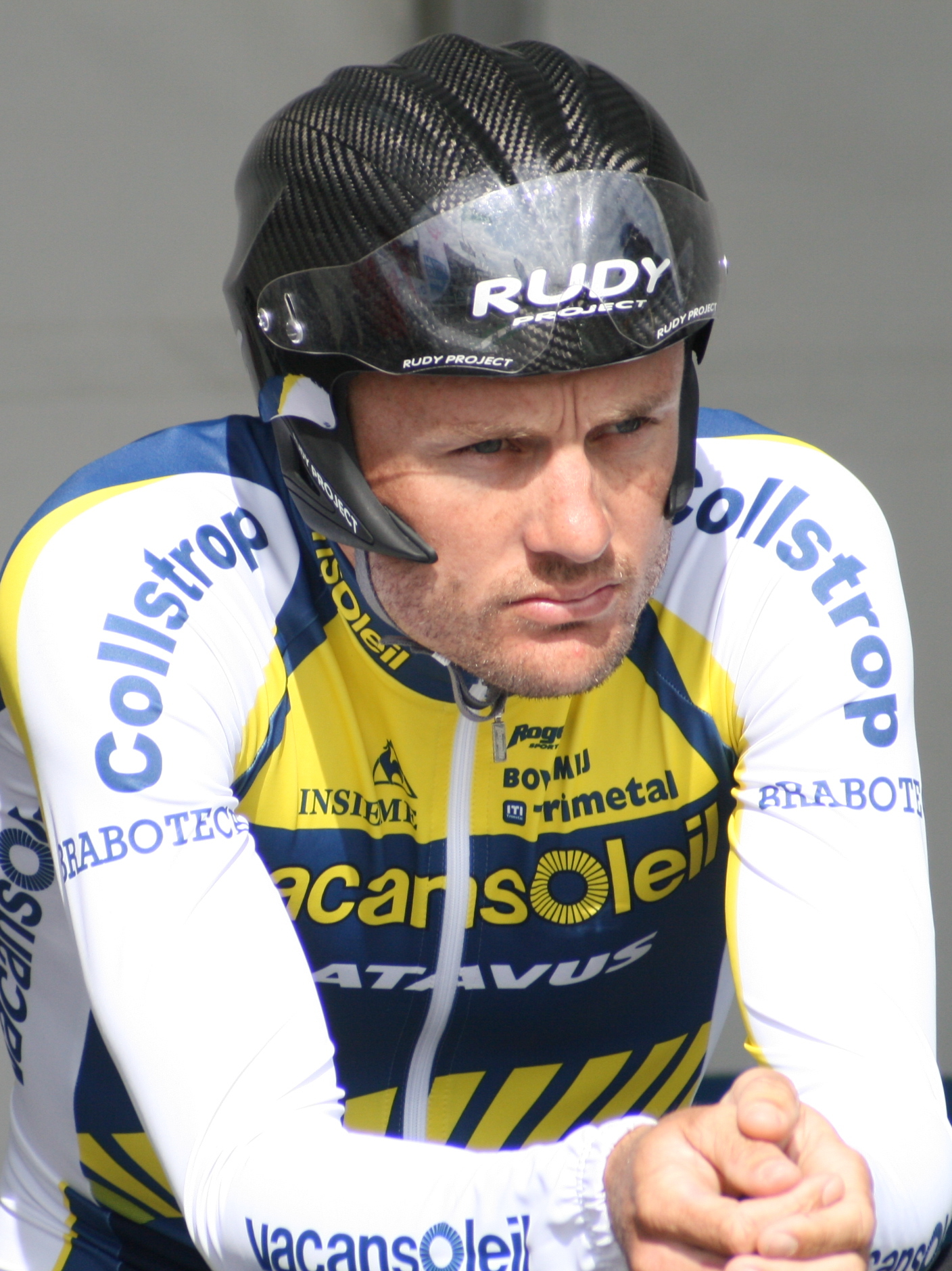 Baden Cooke, lors des Quatre jours de Dunkerque 2009